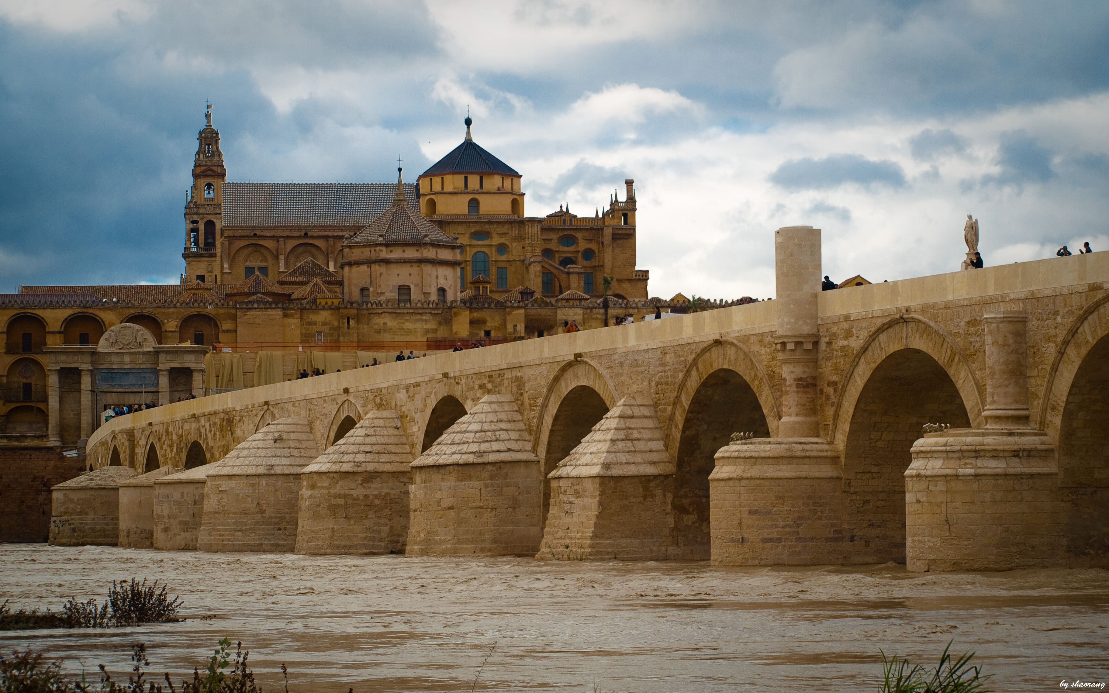 Vista del Puente Romano, de la Mezquita y de la Puerta del Puente, Córdoba (España).